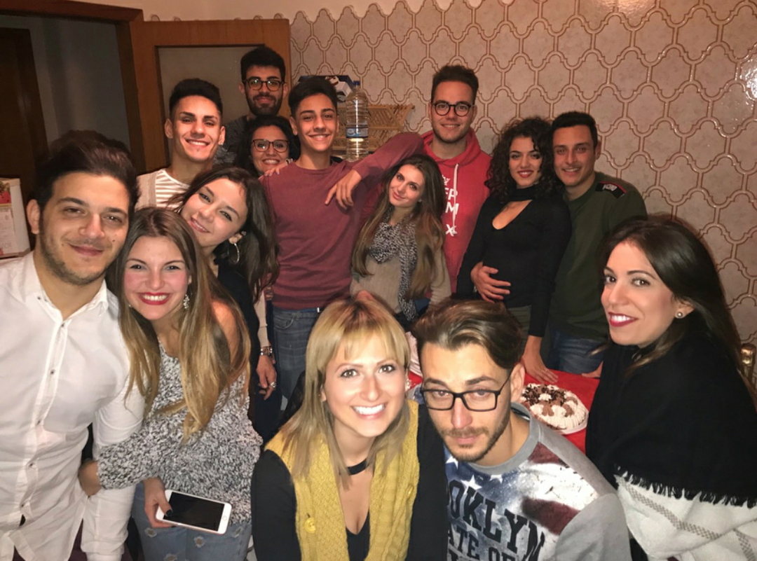 Reunión 2017 de vecinos de Barrio Luján y Barrio San Cayetano de la ciudad de San José de Costa Rica